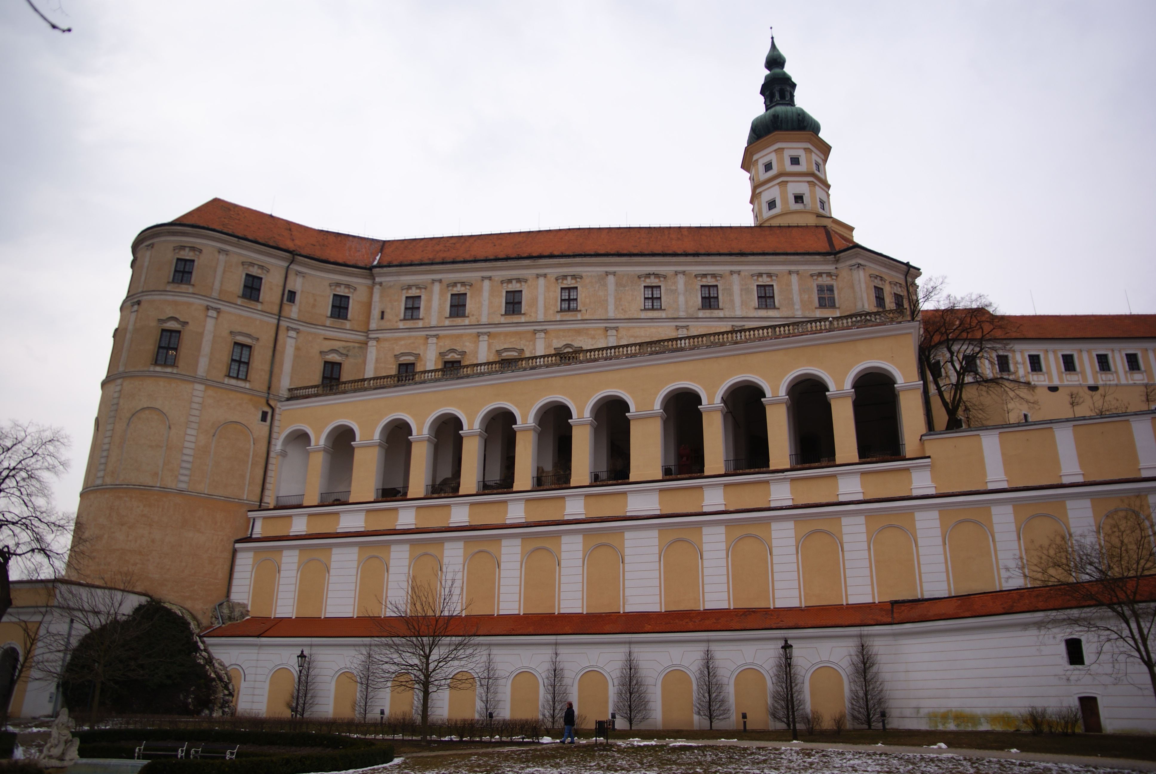 Zámek Mikulov, Zámek 1/4, Mikulov